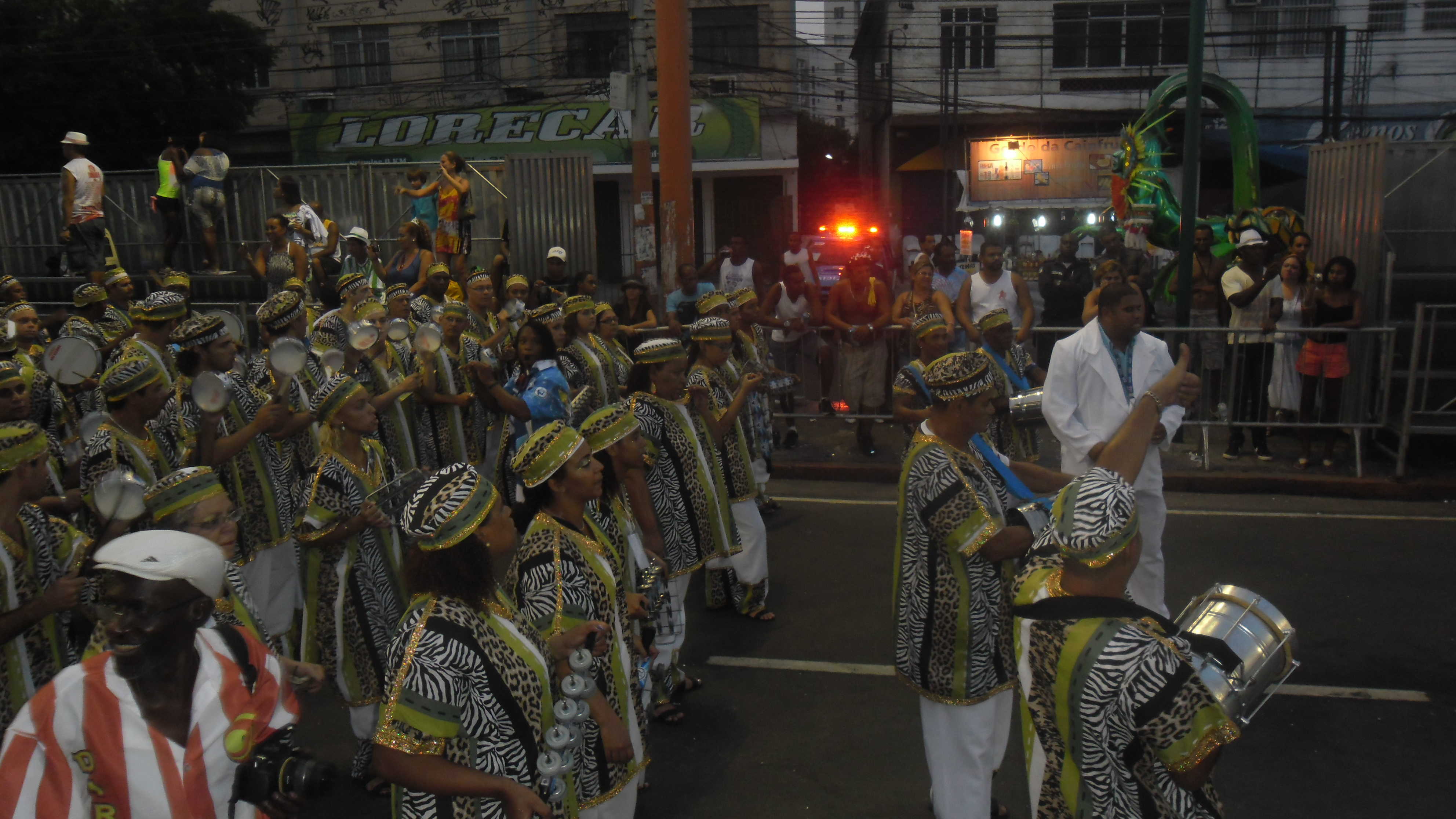 GRES Acadêmicos do Sossego